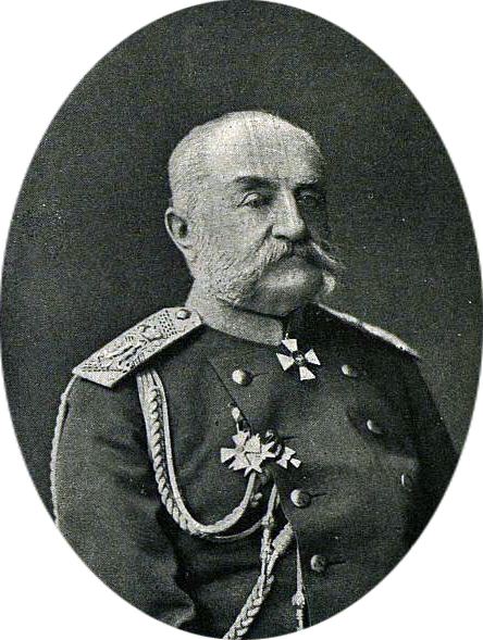 Генерал-адъютант Артур Адамович Непокойчицкий, начальник штаба действующей армии